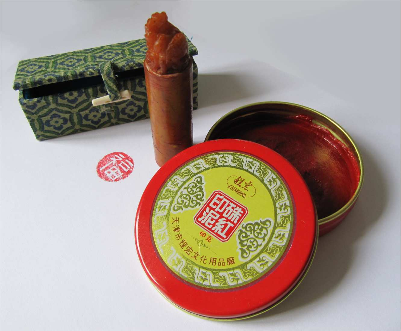 klassisches chinesisches Siegelset